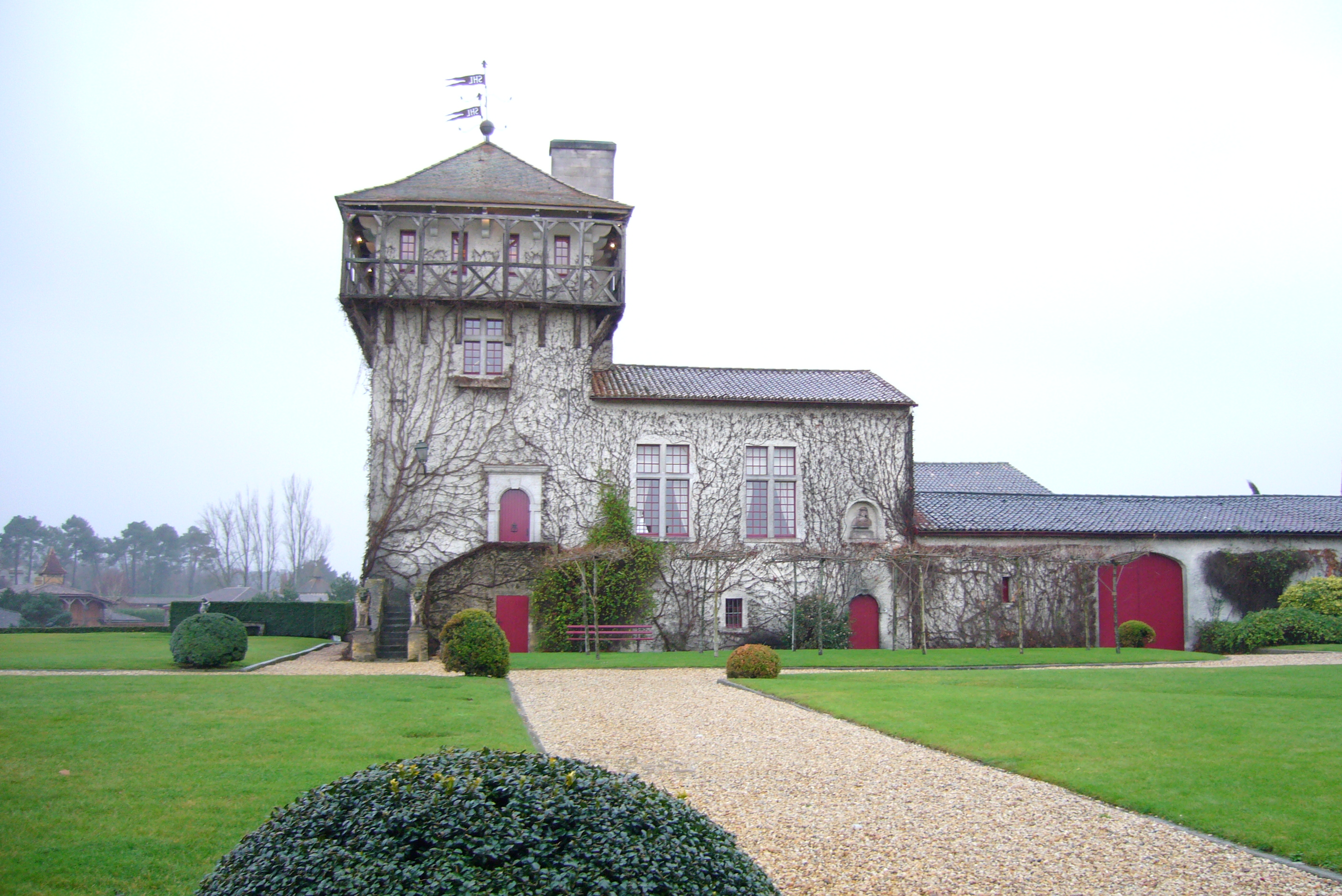 Château Smith Haut Lafitte 2007